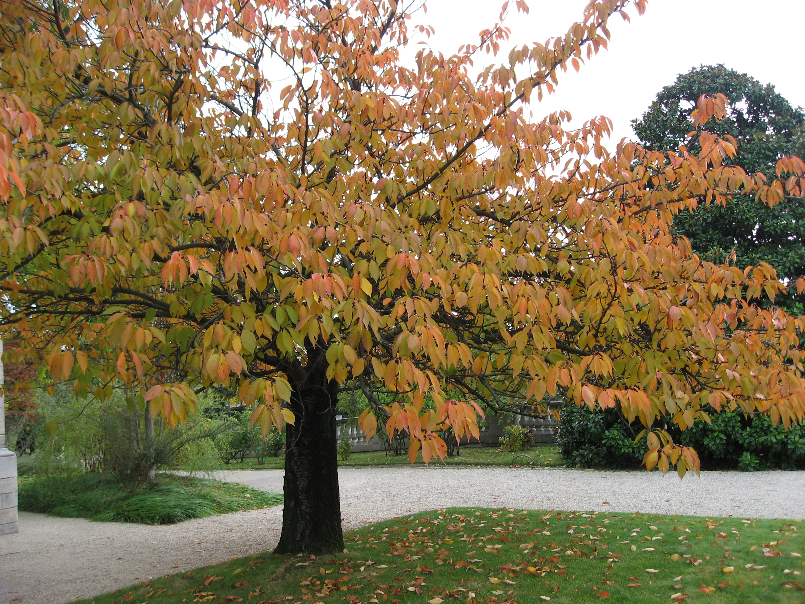 Prunus serrulata in Serres d'Auteuil